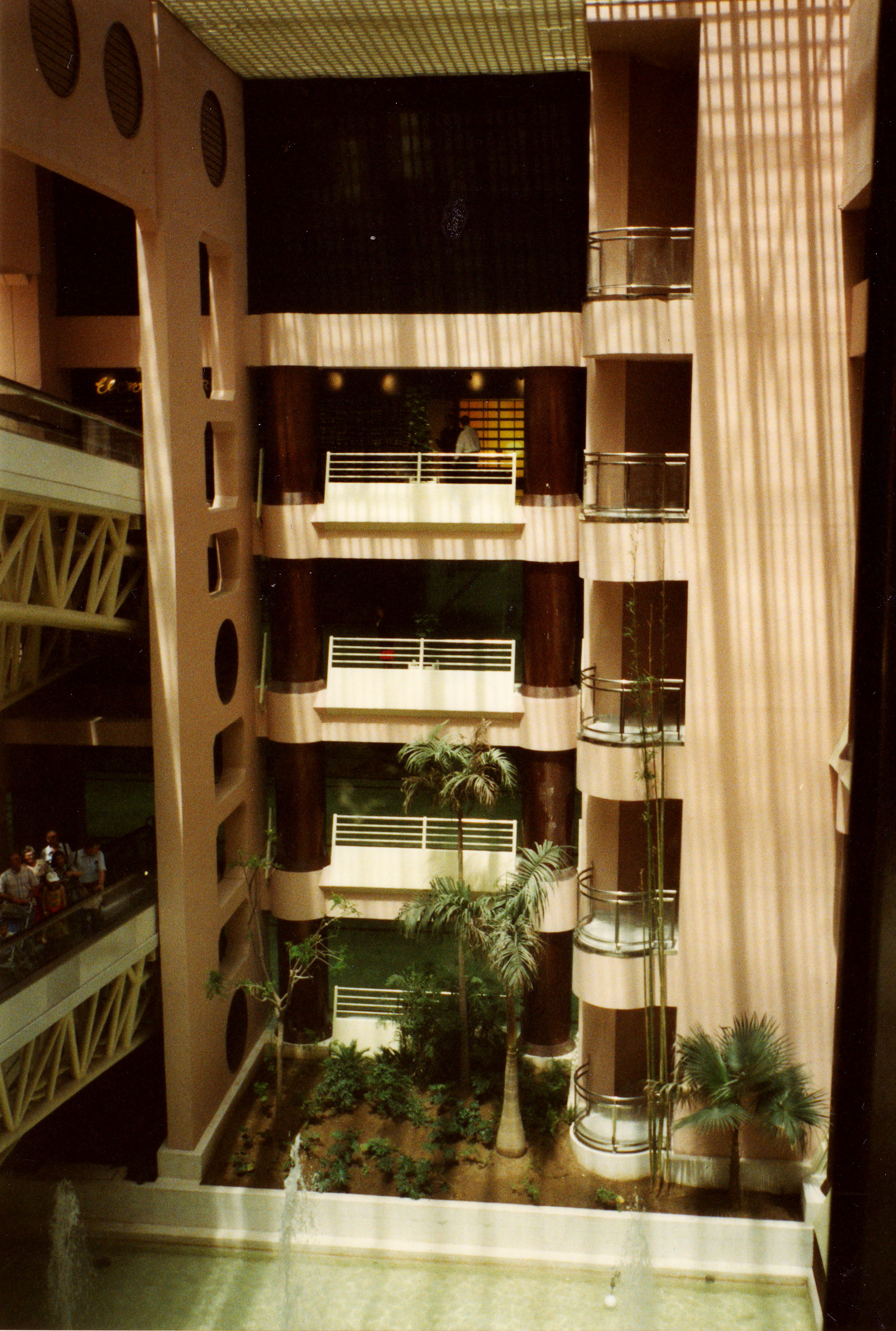 Exposición Universal Sevilla 92. Viaje en Abril; Edificio "Plaza de América"; actual sede de la Escuela Superior de Ingenieros de Sevilla